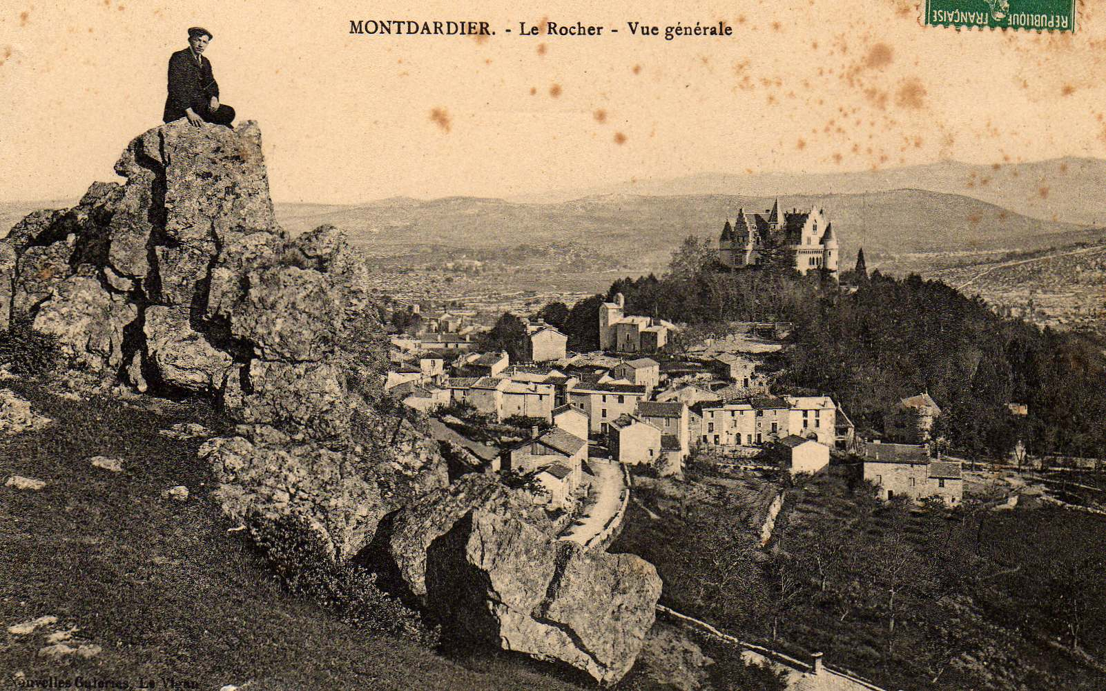 vue générale de Montdardier, carte postale ancienne